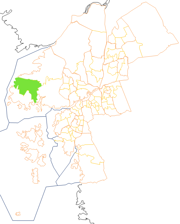 Karta som visar primärområdes belägenhet i Göteborg